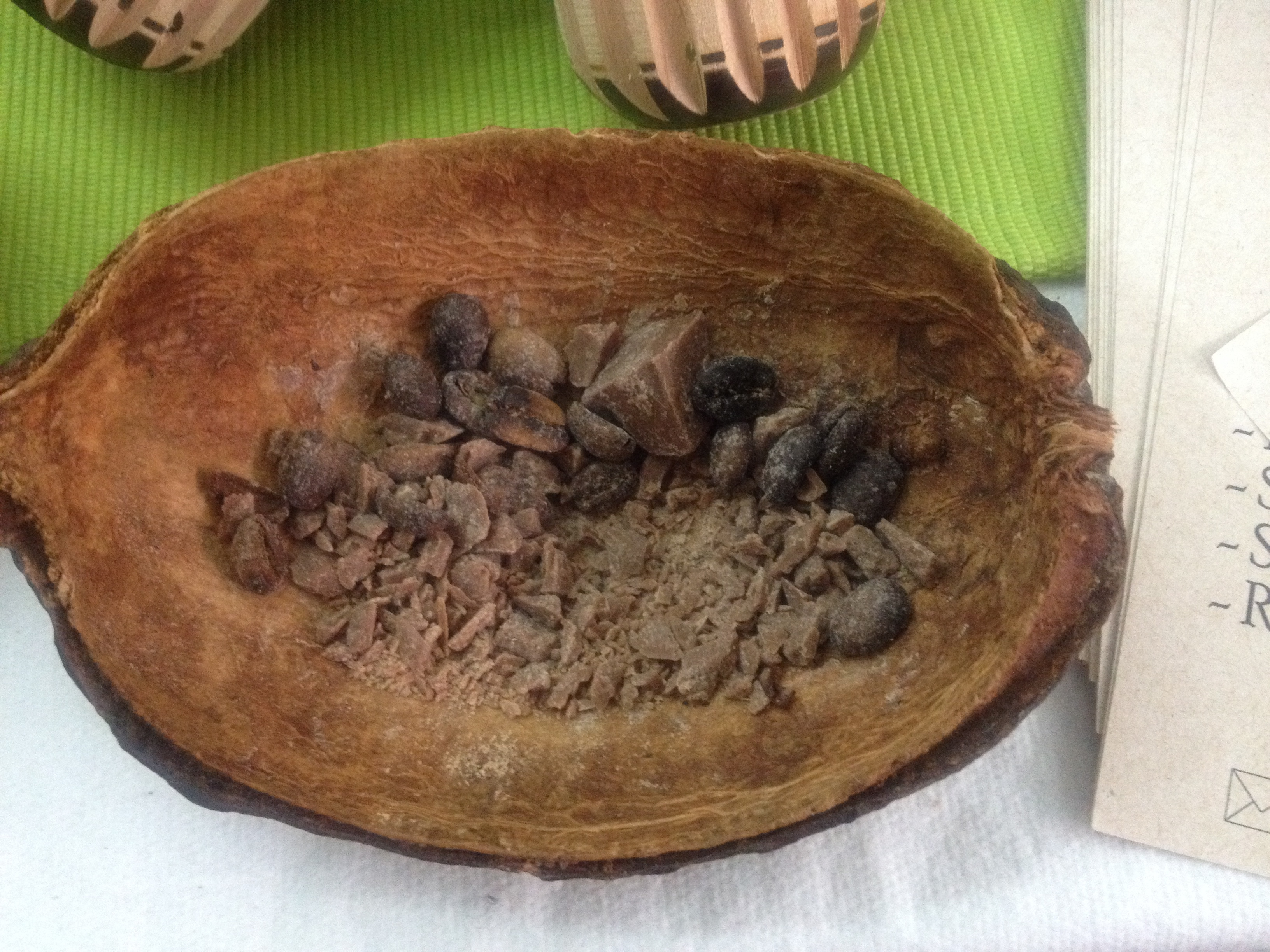 Chocolate con café del estado mexicano de Guerrero